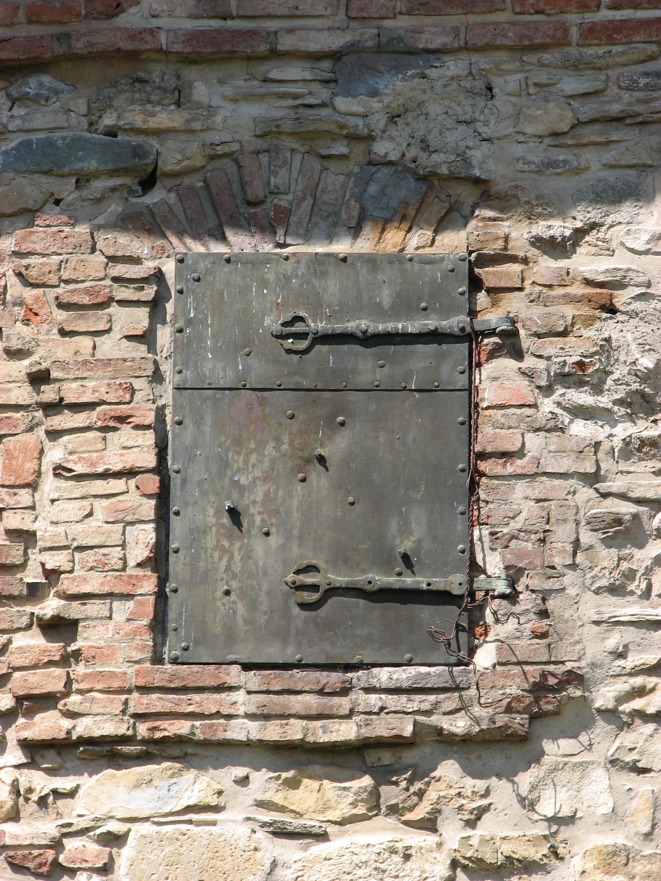 Manastirea Neamtului - July 2008